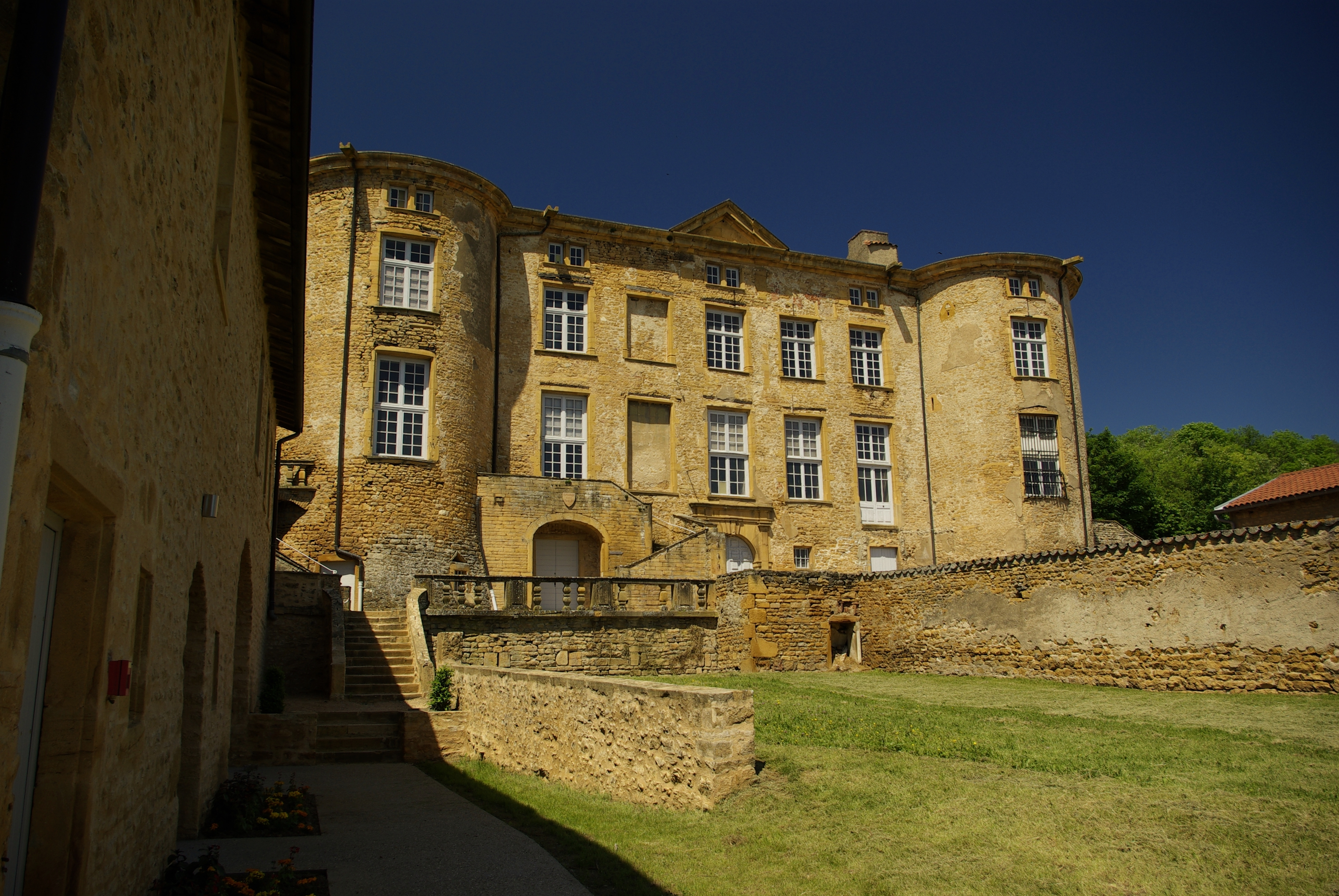 Château de Rochebonne, à Theizé (69620), Sud Beaujolais, département du Rhône (69) - France.